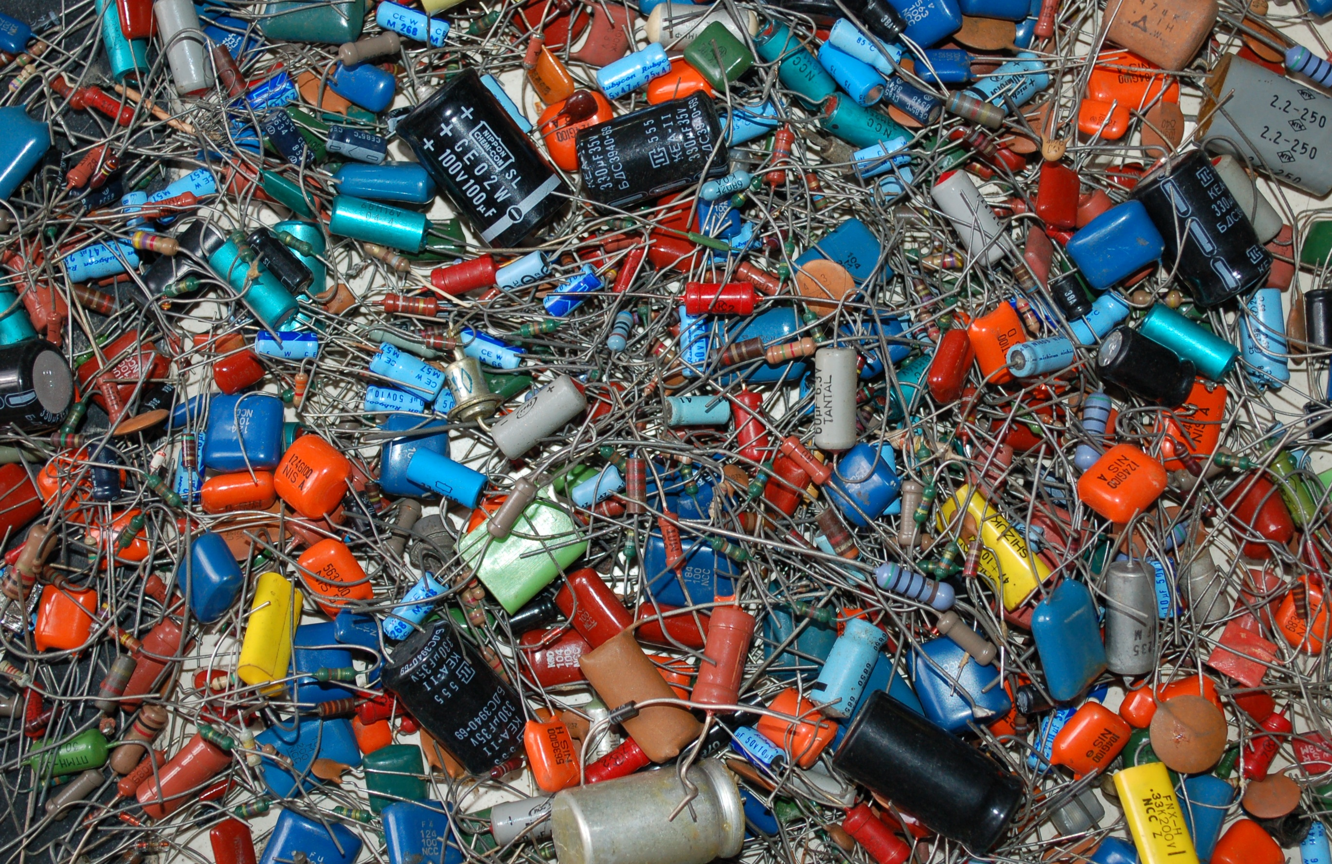 Variedad de componentes electronicos